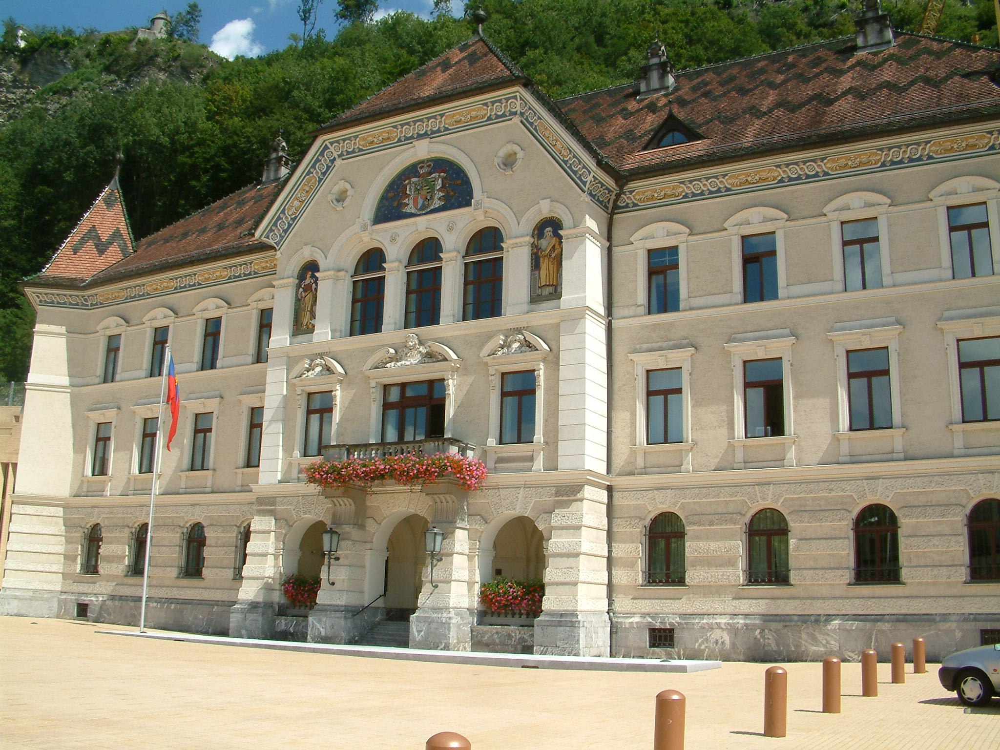 Regierungsgebäude, Vaduz, Liechtenstein